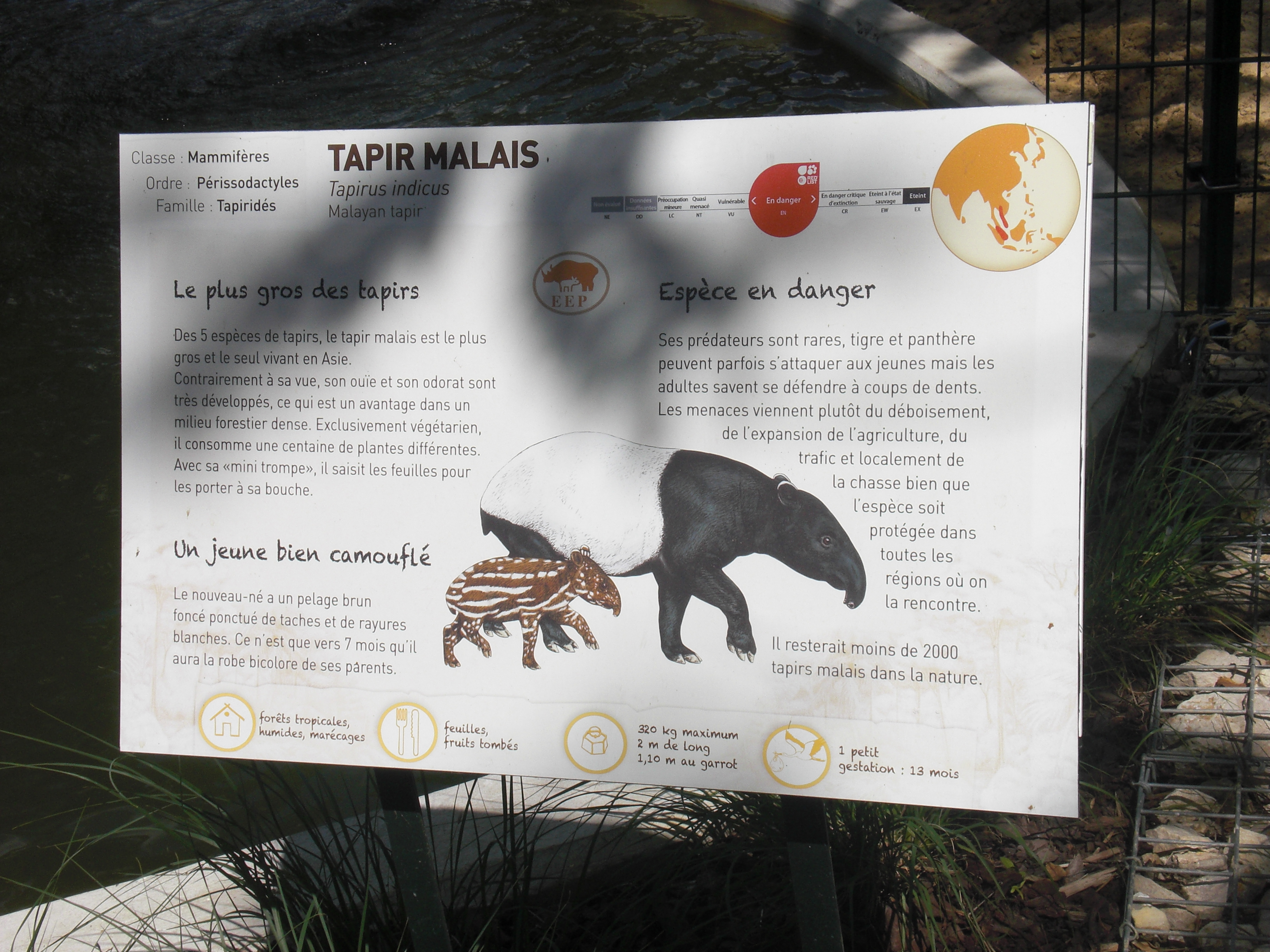 Malaja tapiro